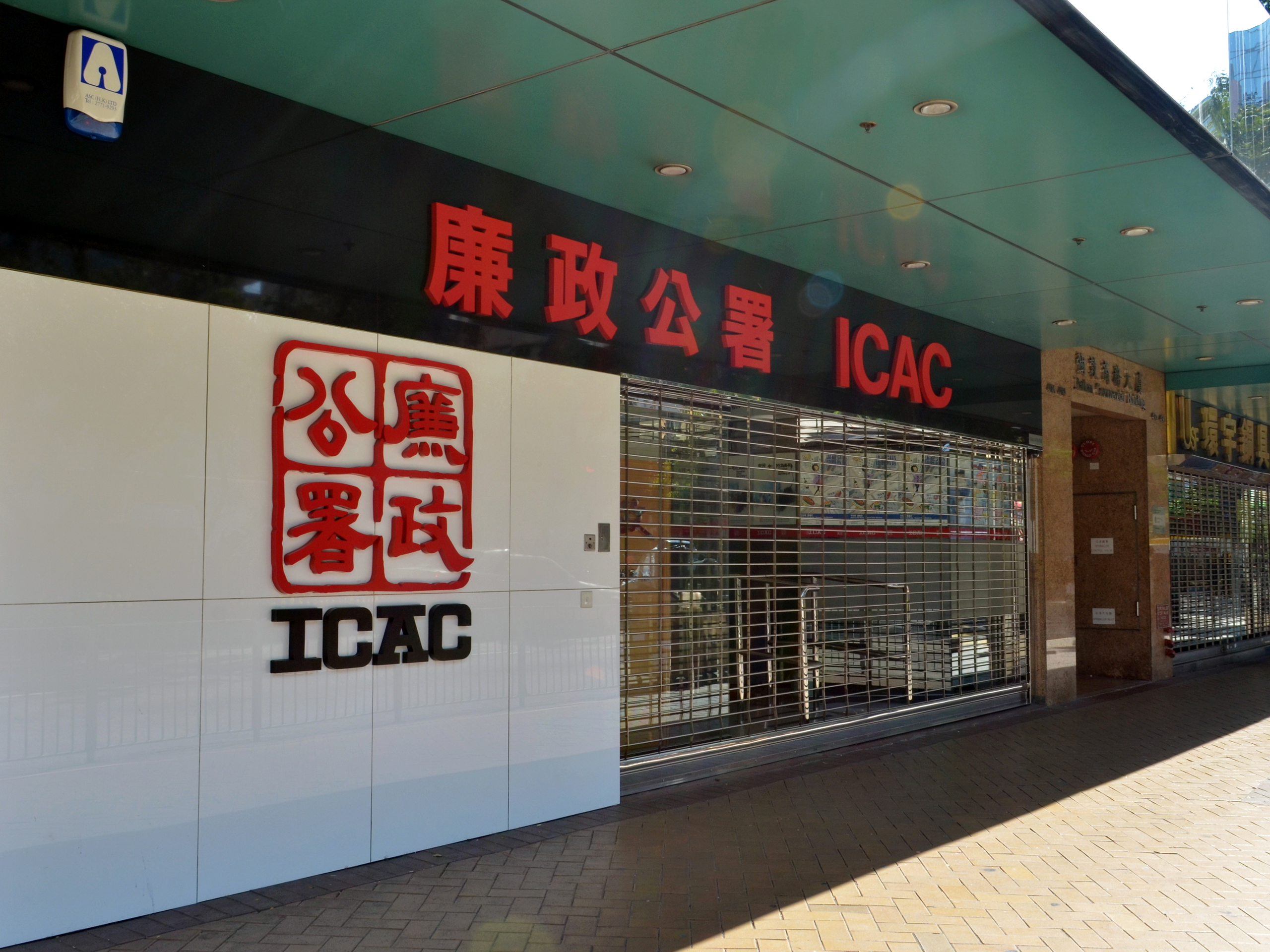 位于香港九龙弥敦道的廉政公署办公地